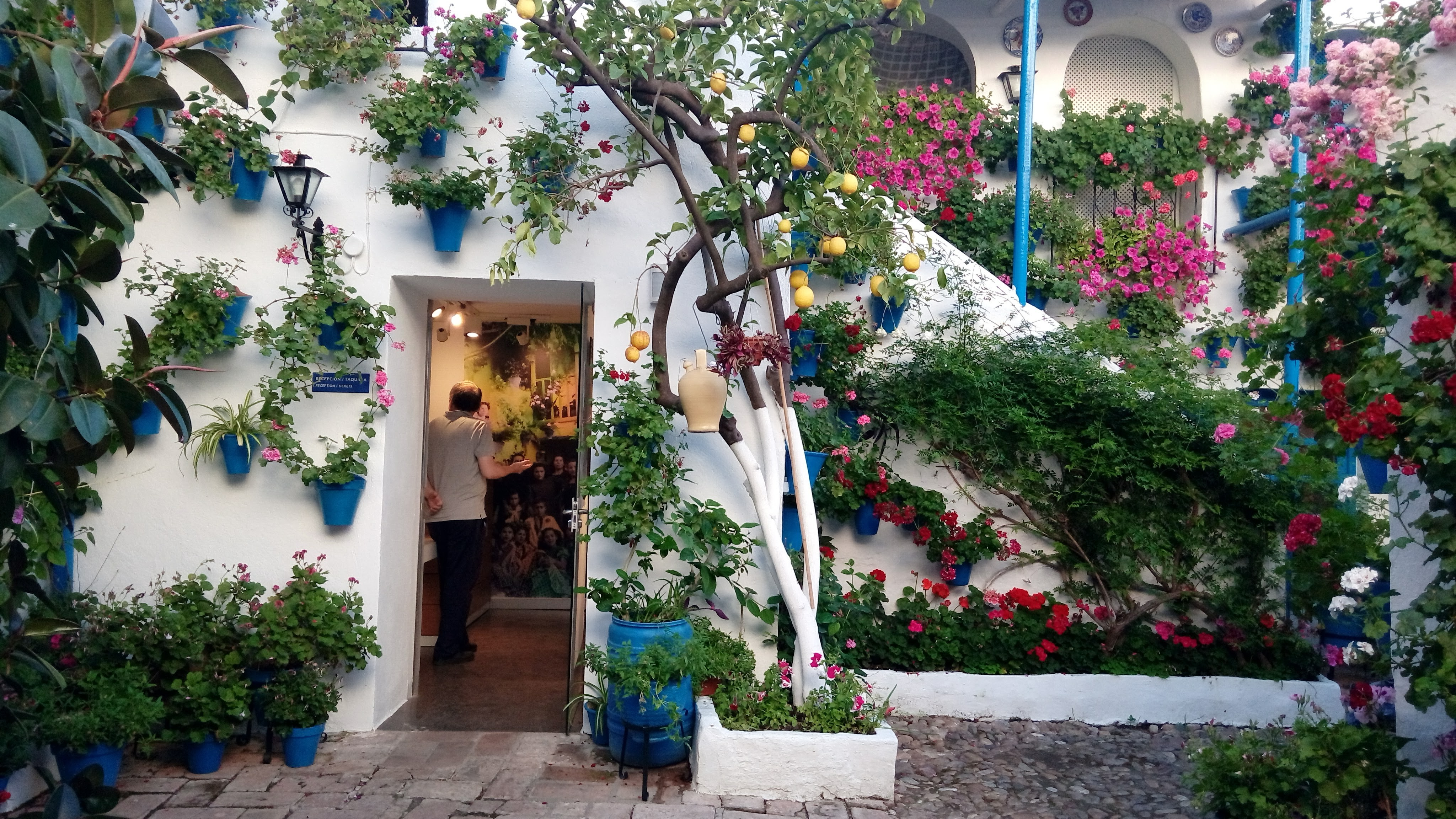 Córdoba. Patios de Córdoba